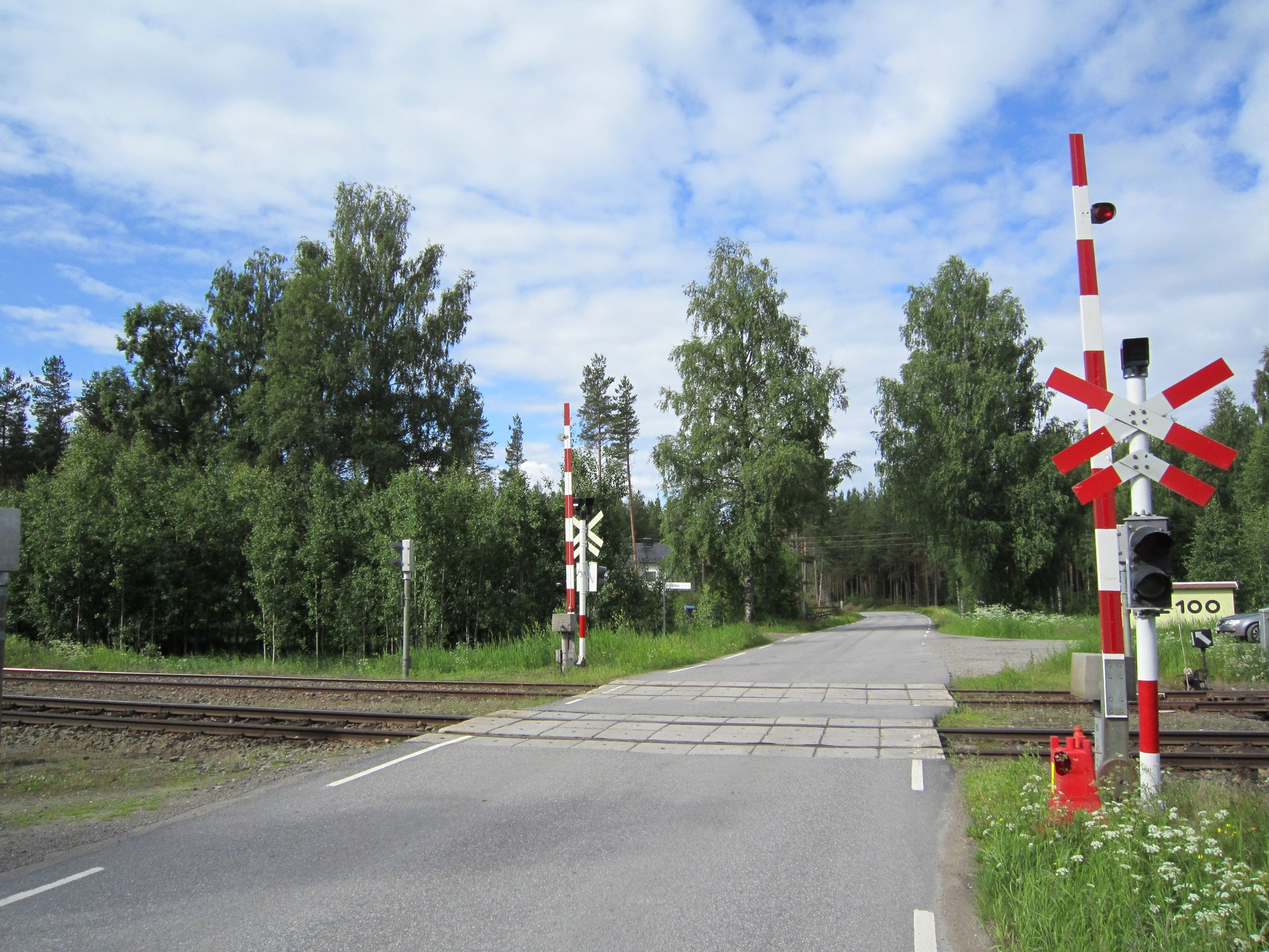 Fylkesvei 491 krysser Solørbanen på Braskereidfoss.